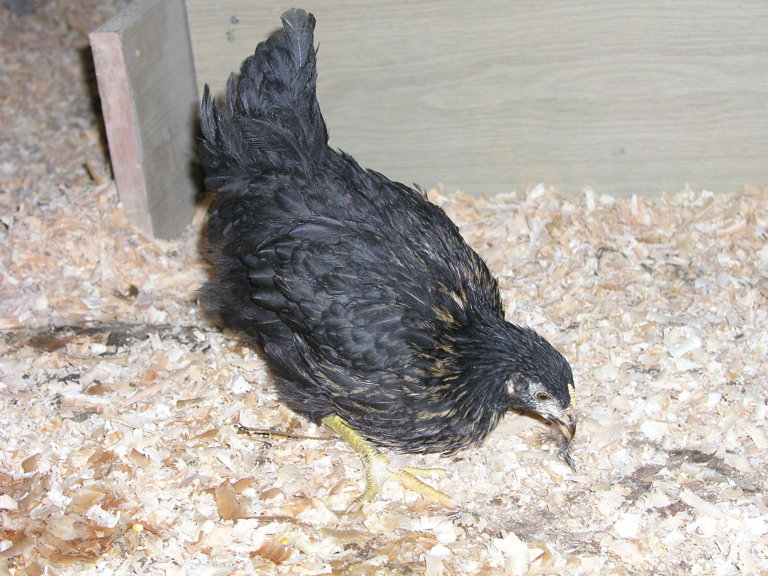 Maran (Huhn)